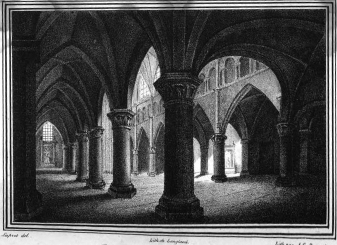 Vue intérieure de Saint-Anatoile.